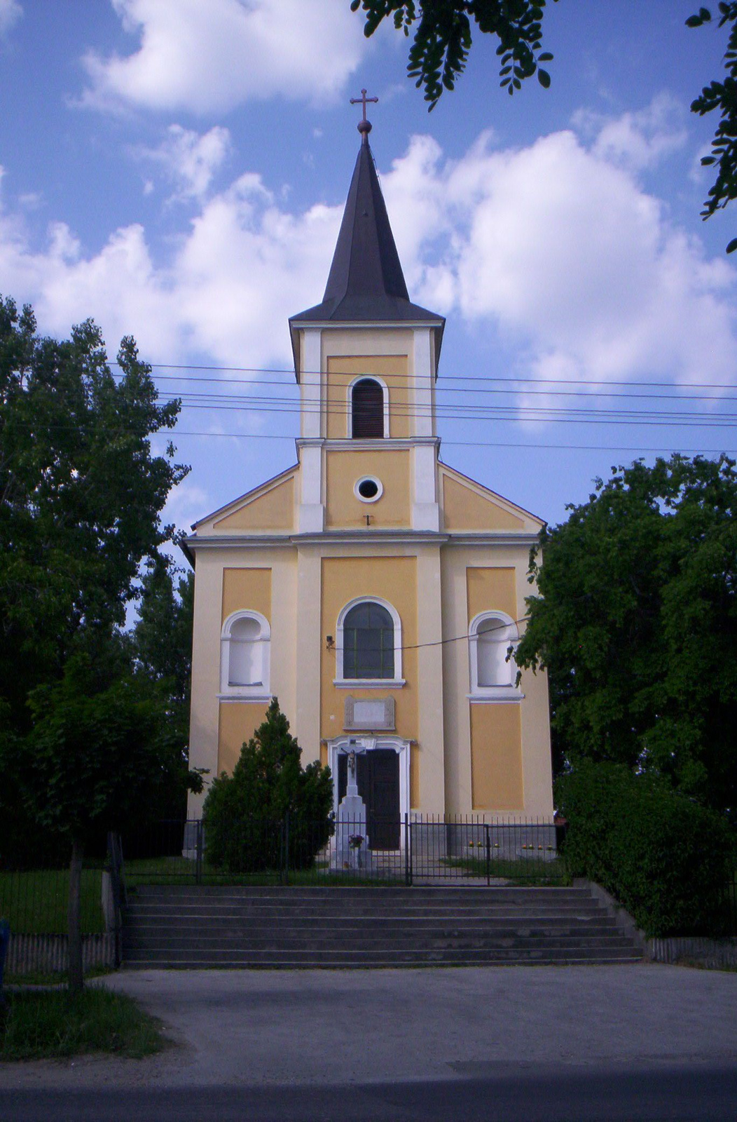 Római katolikus templom (Ecser, Szabadság tér)